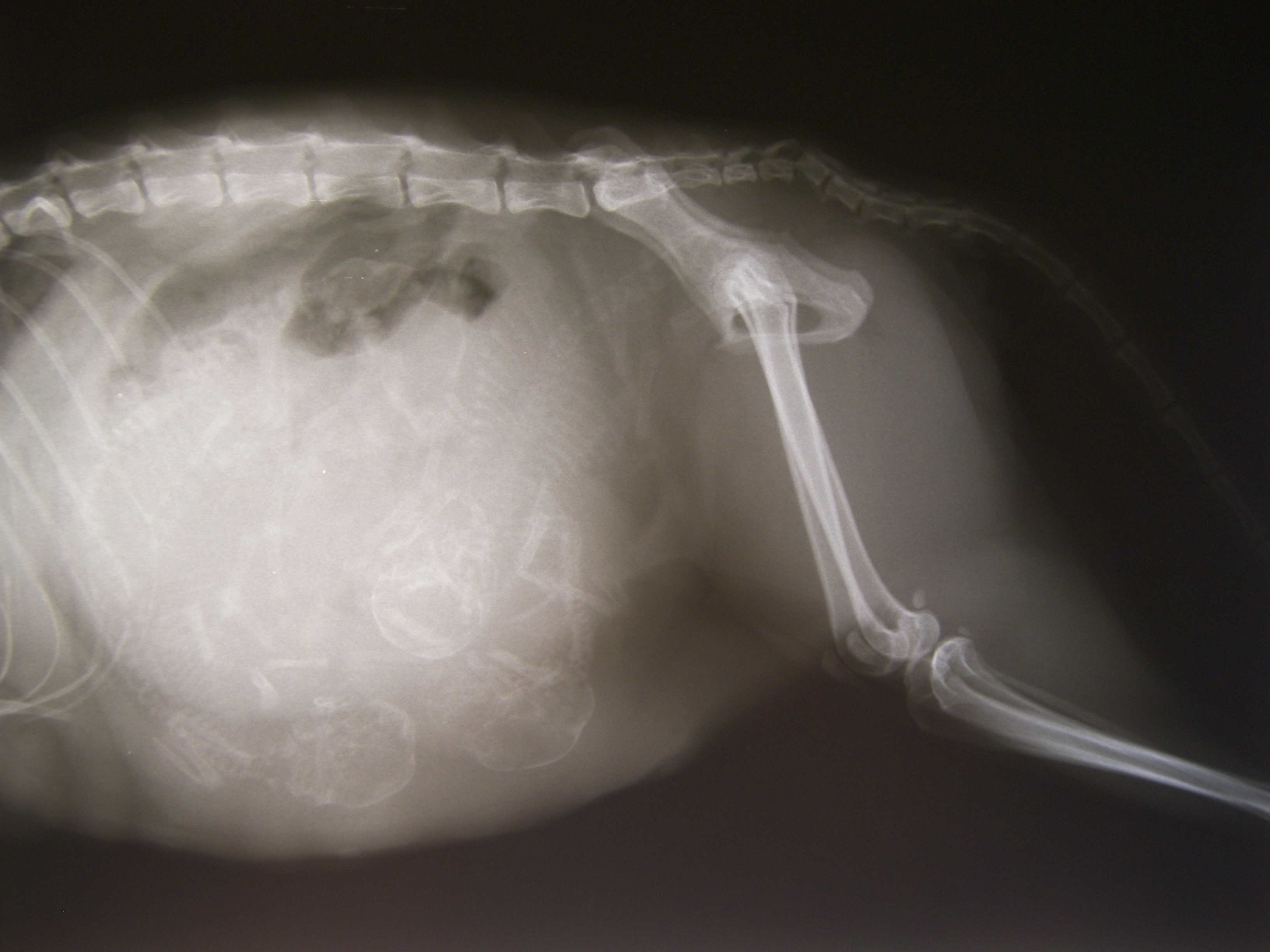 Radio de Gestation d'une chienne